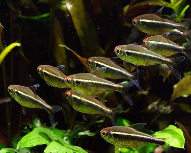 Pesti Neon Negru